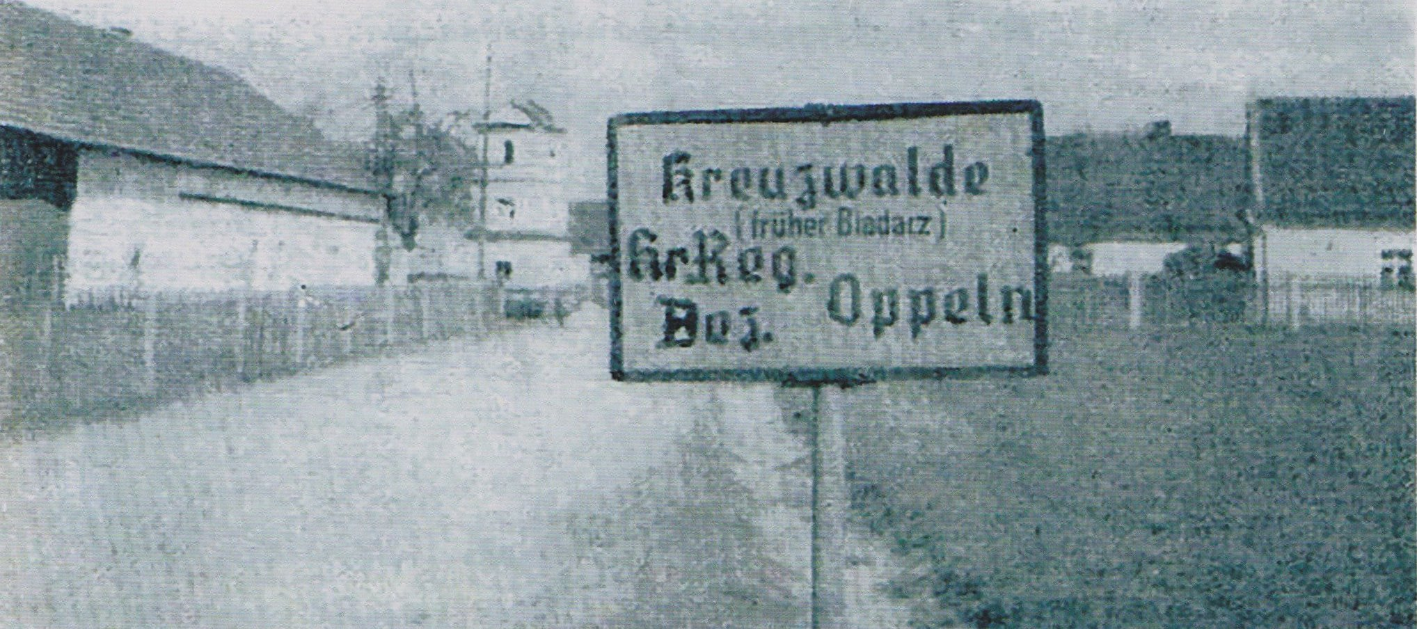 Ortseinfahrt nach Kreuzwalde um 1936 Kreis Oppeln